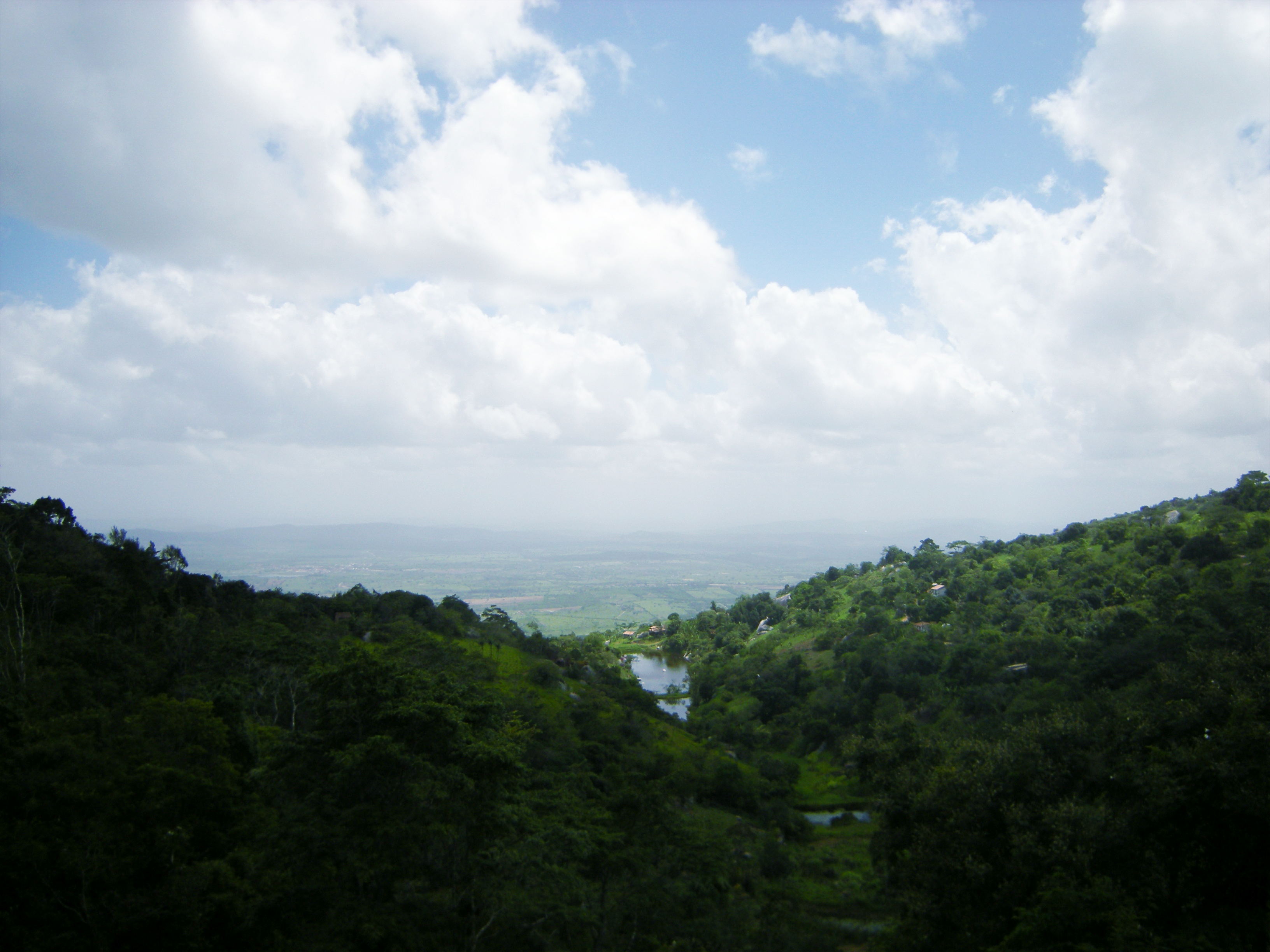 A Serra Negra localizada no município de Bezerros tem 960 metros de altitude e abriga um parque ecológico com Fauna e Flora de vestígios da Mata Atlântica.